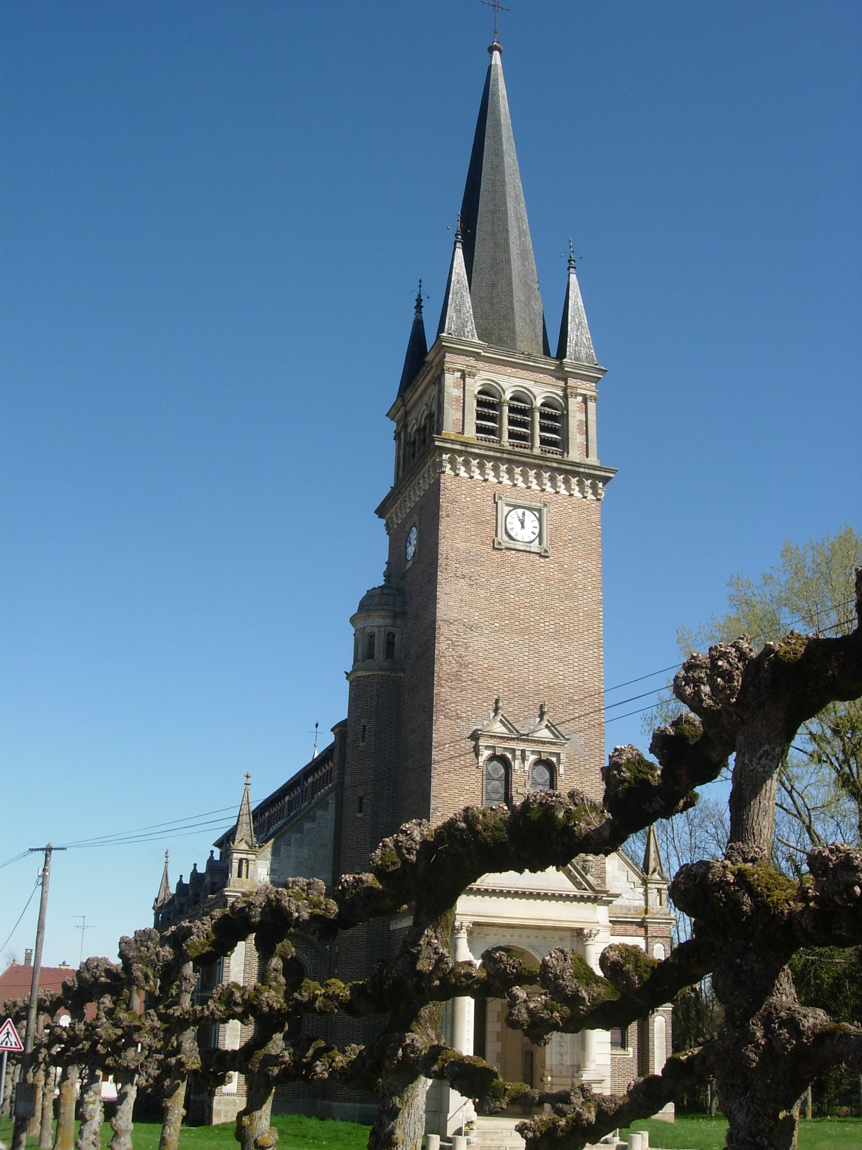 Eglise de Bercenay-en-Othe